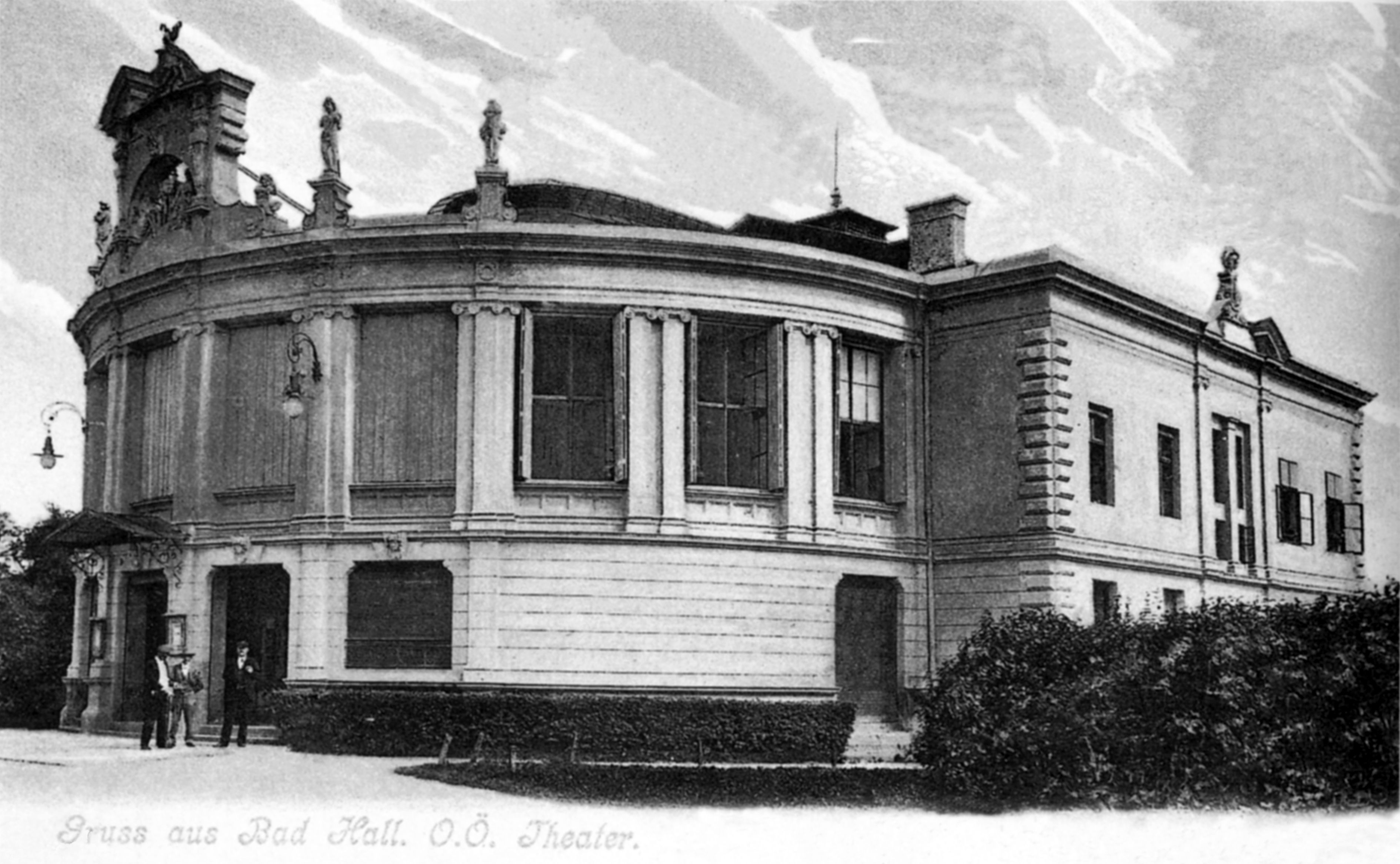 Bad Hall, Stadttheater, erbaut: 1883–84, Architekt: Alois Maria Wurm